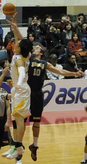 2013年全日本総合バスケットボール選手権大会3回戦、リンク栃木ブレックス対東海大学。代々木第一体育館で。